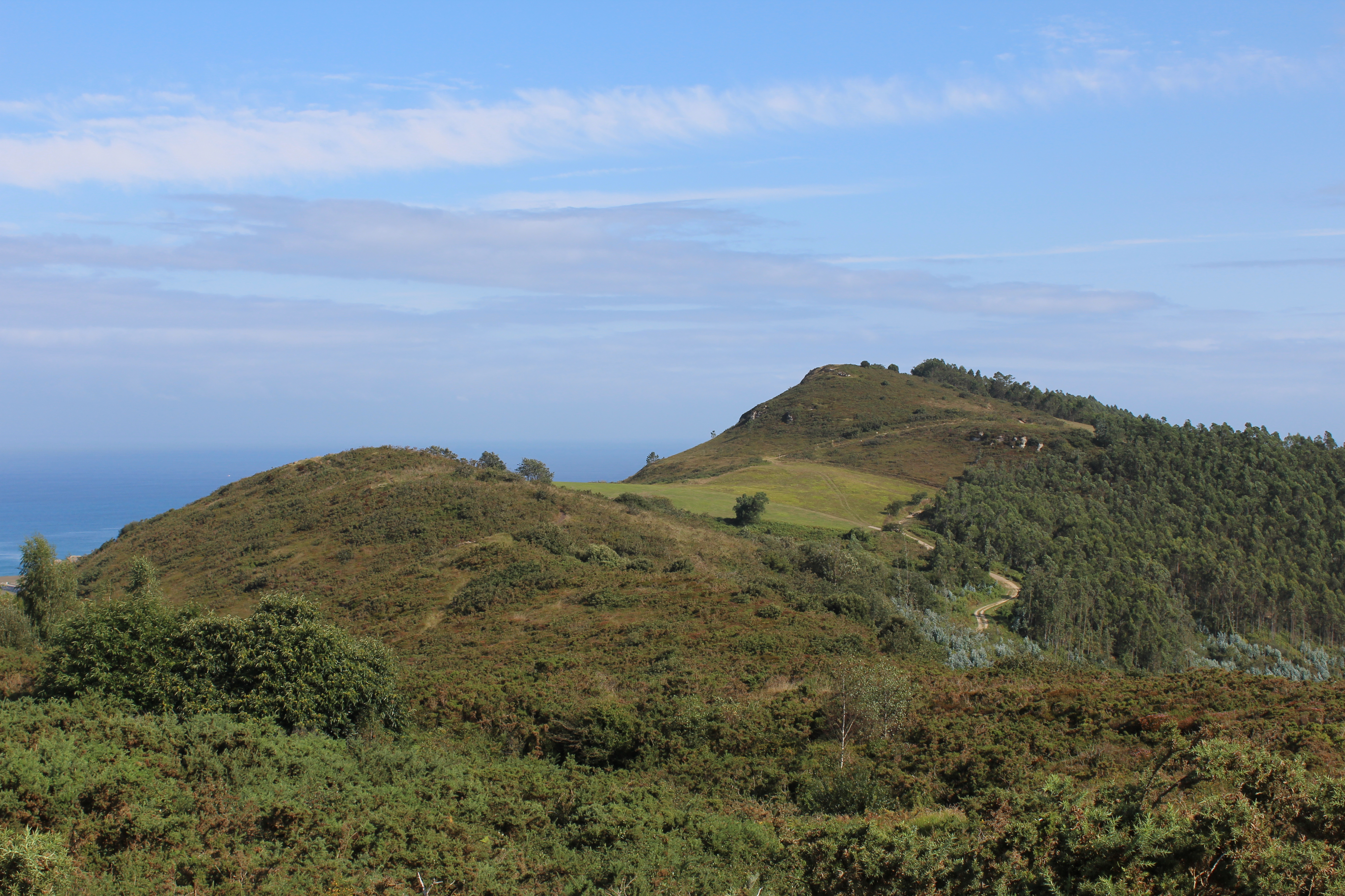 Monte Tolio. Mortera. Cantabria.